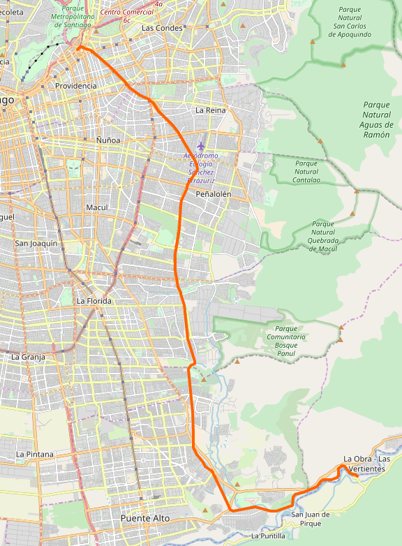 Recorrido del Canal San Carlos en Santiago de Chile